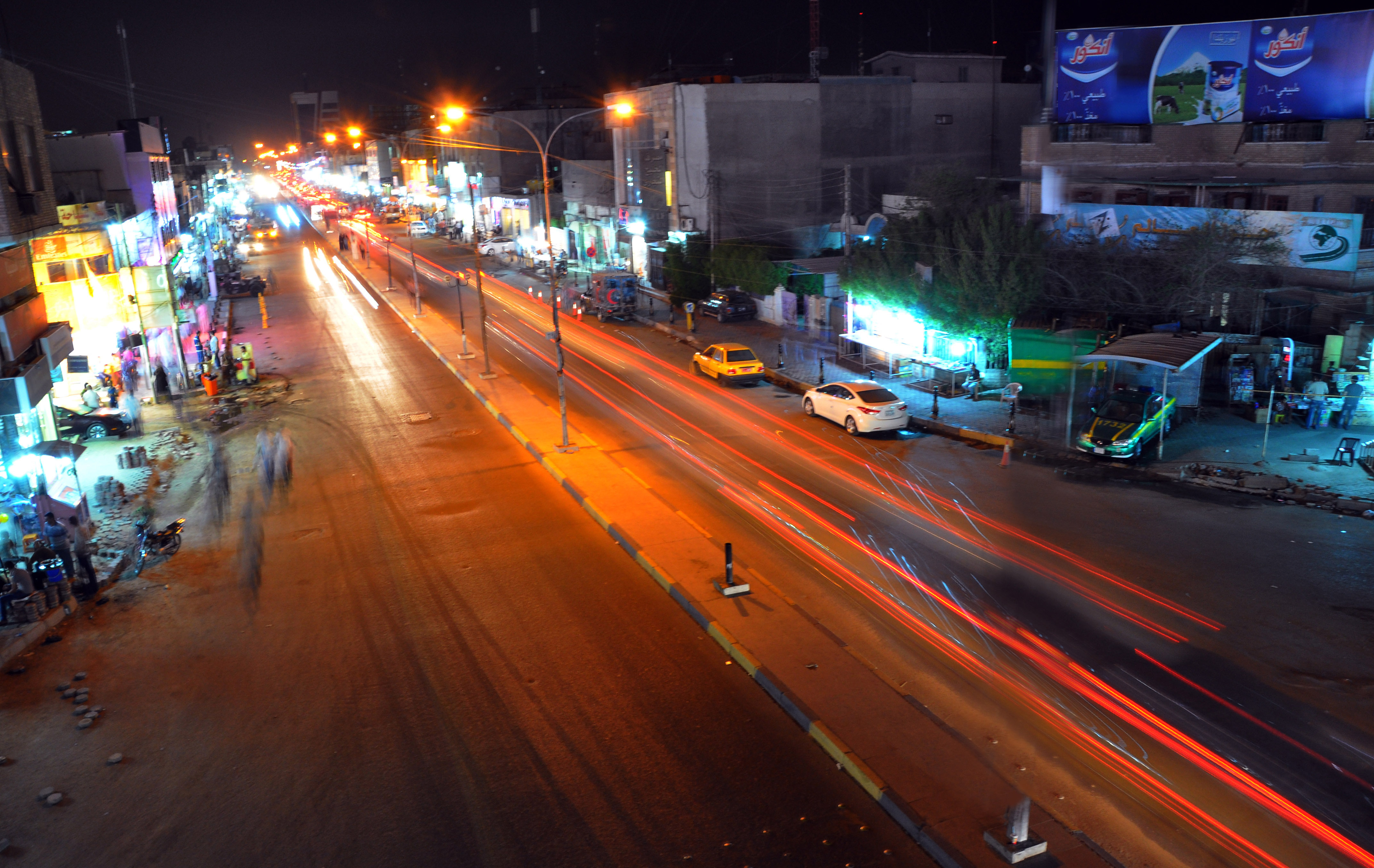 منظر لشارع الجزائر في البصرة ليلاً